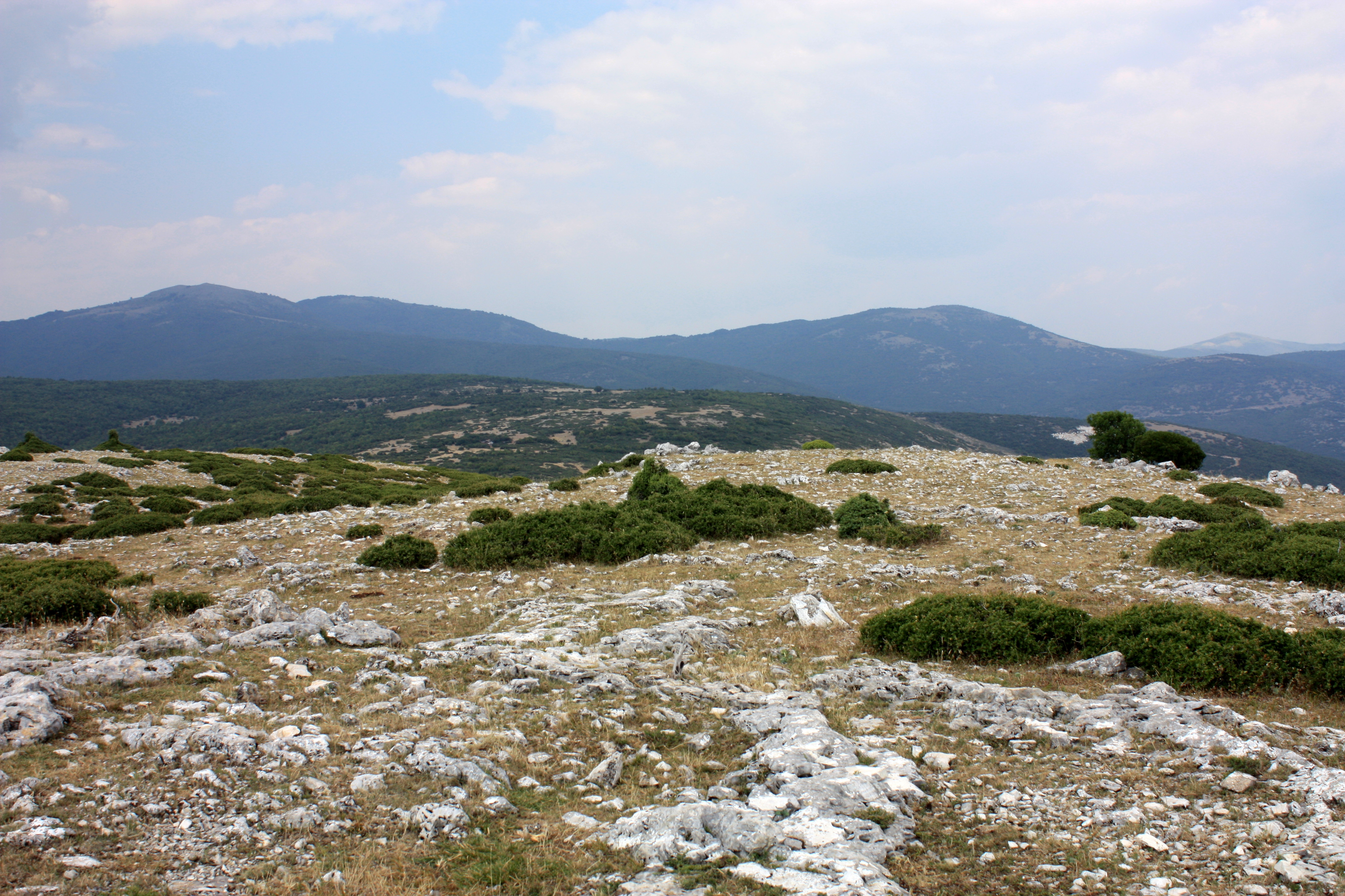 Blick auf das Lekani-Bergmassiv, ein Gebirgsstock in den südlichen Griechischen Rhodopen.